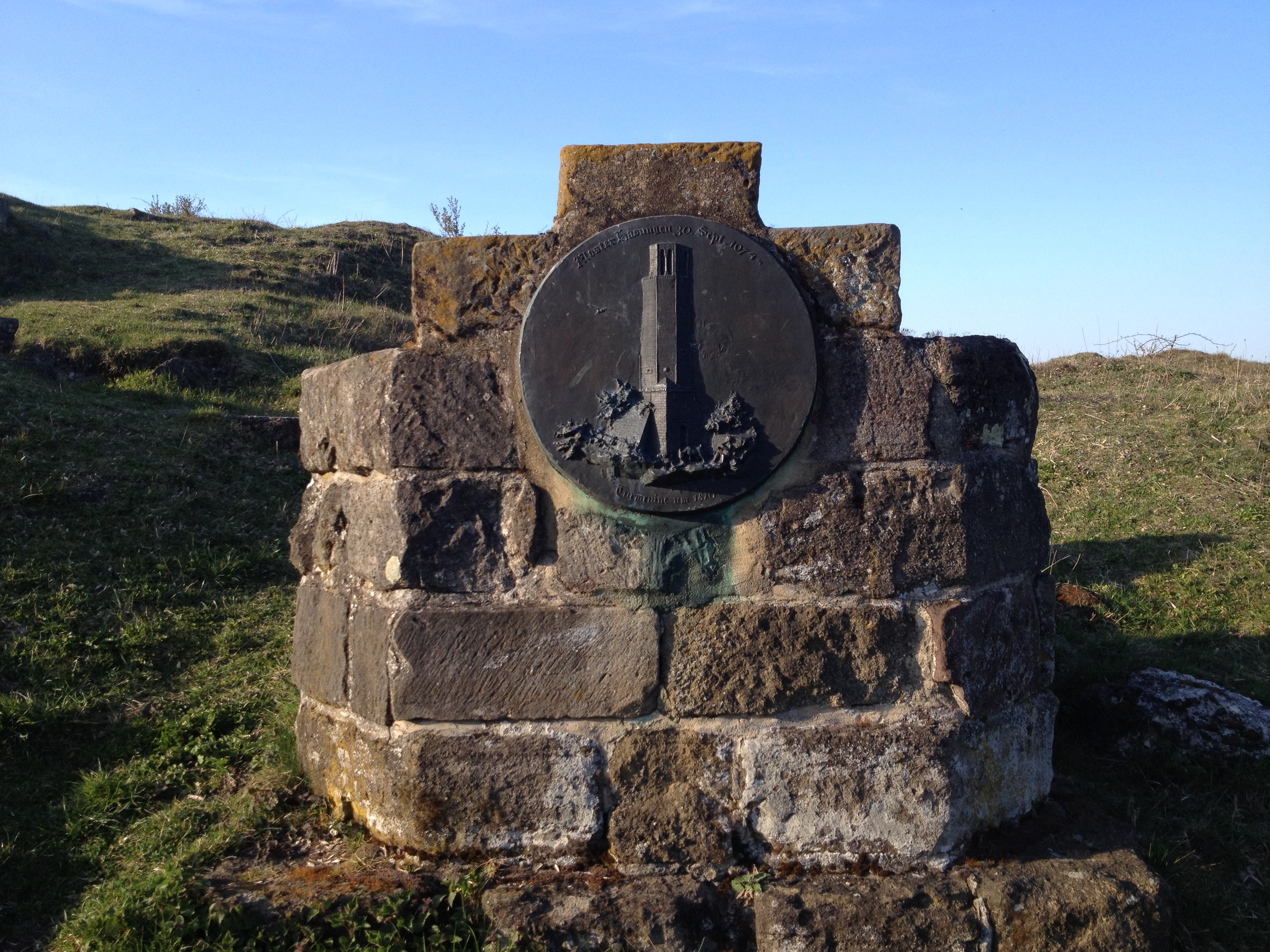 Letzte Überbleibsel des Kloster Hasungen